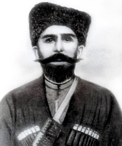 Залимхан чеченский абрек